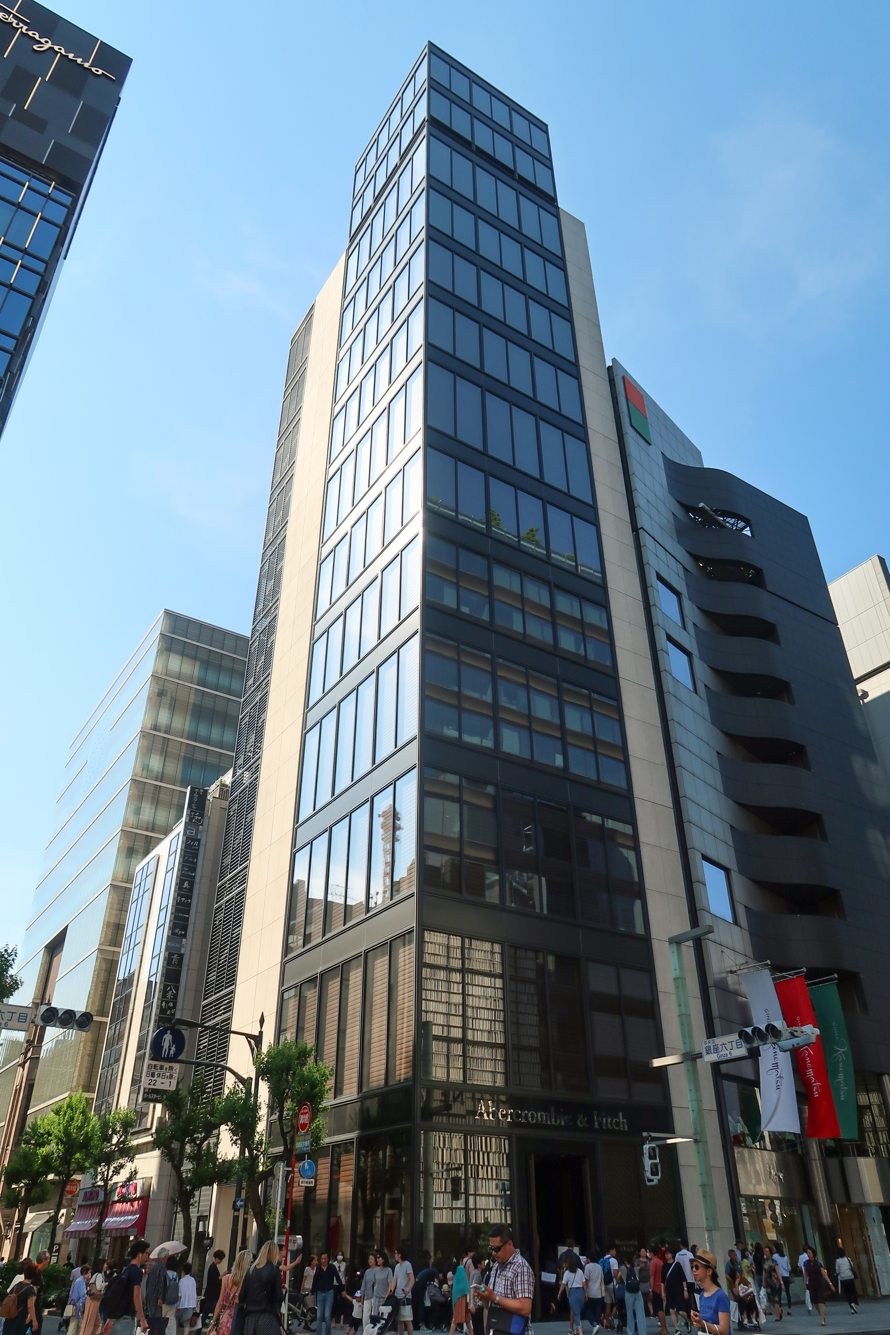 Abercrombie & Fitch Ginza Store